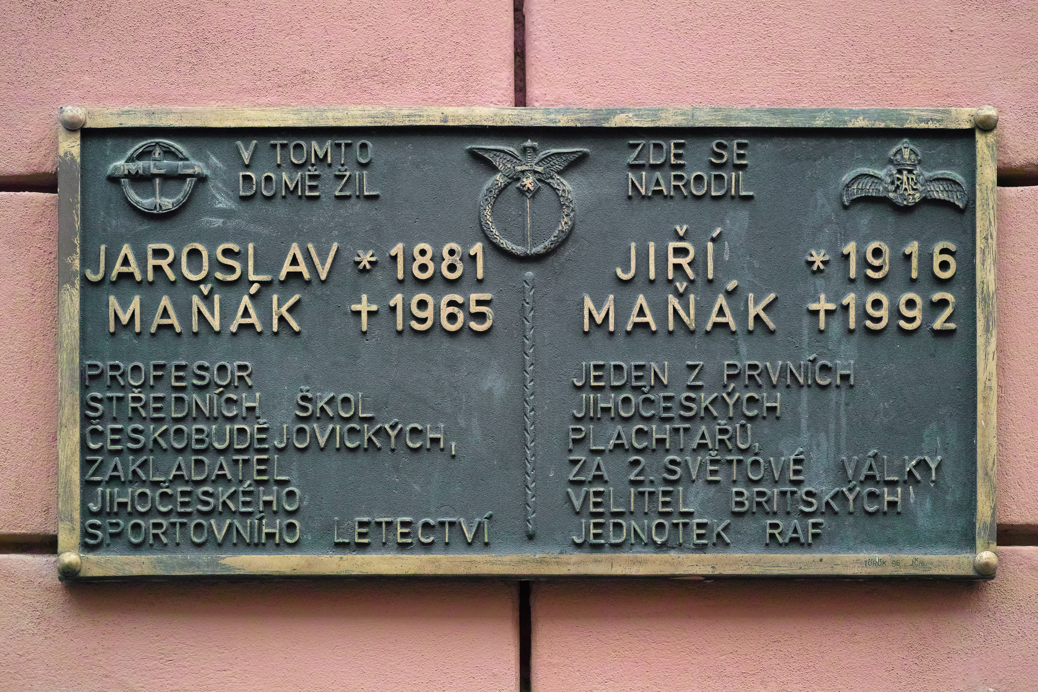 Pamětní deska rodiny Maňákových, umístěná na domě Dr. Stejskala 110/11 ze Široké ulice, Č. Budějovice